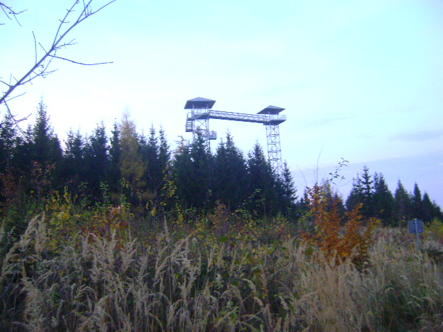 Graniczna Góra szczyt graniczny o wysokości 541 m n.p.m. w Polsce i Czechach, w Górach Opawskich w Sudetach Wschodnich